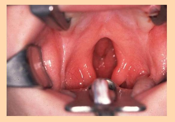 před operací